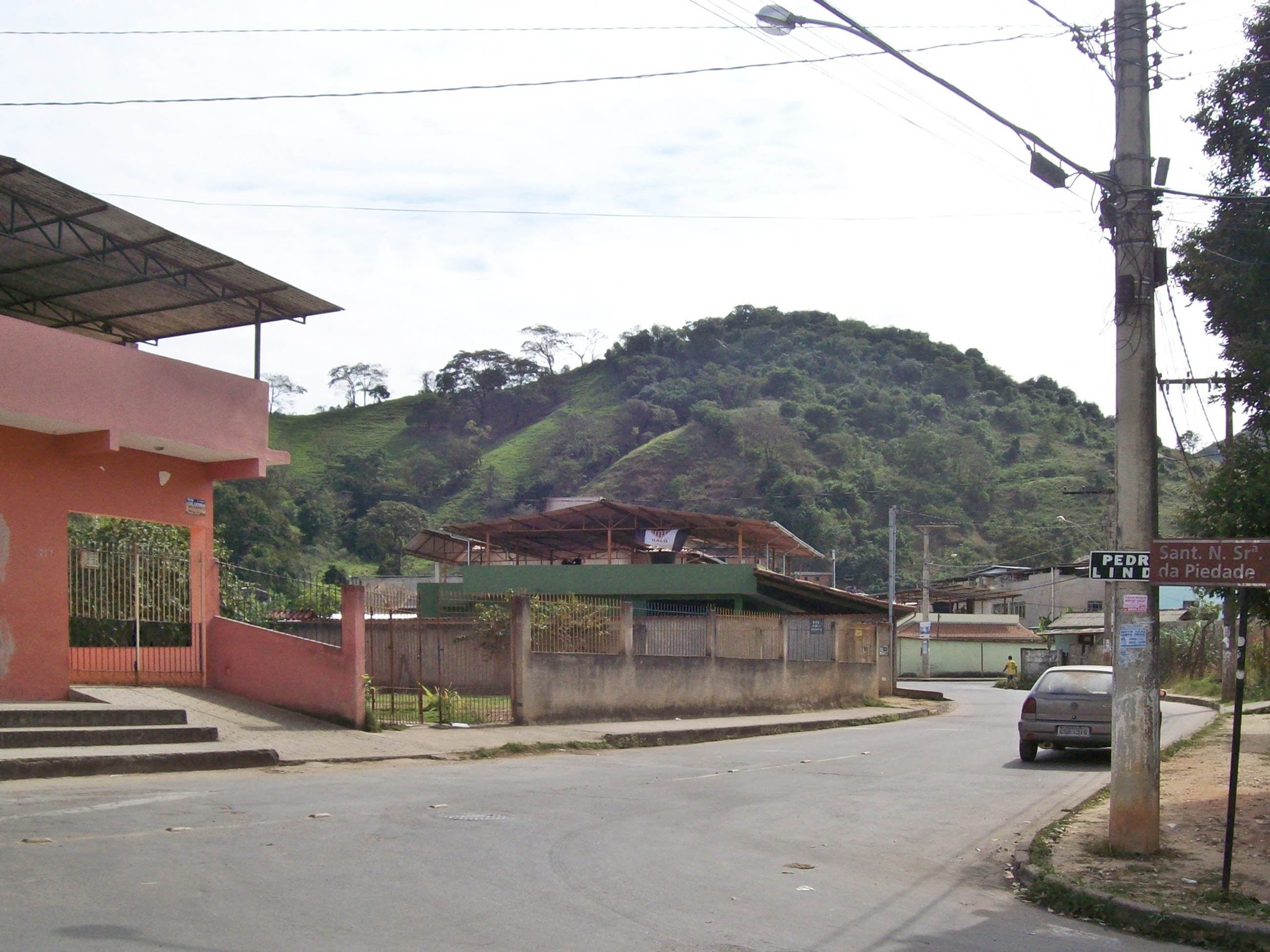 Entrada do bairro Pedra Linda, em Coronel Fabriciano, Minas Gerais, Brasil.